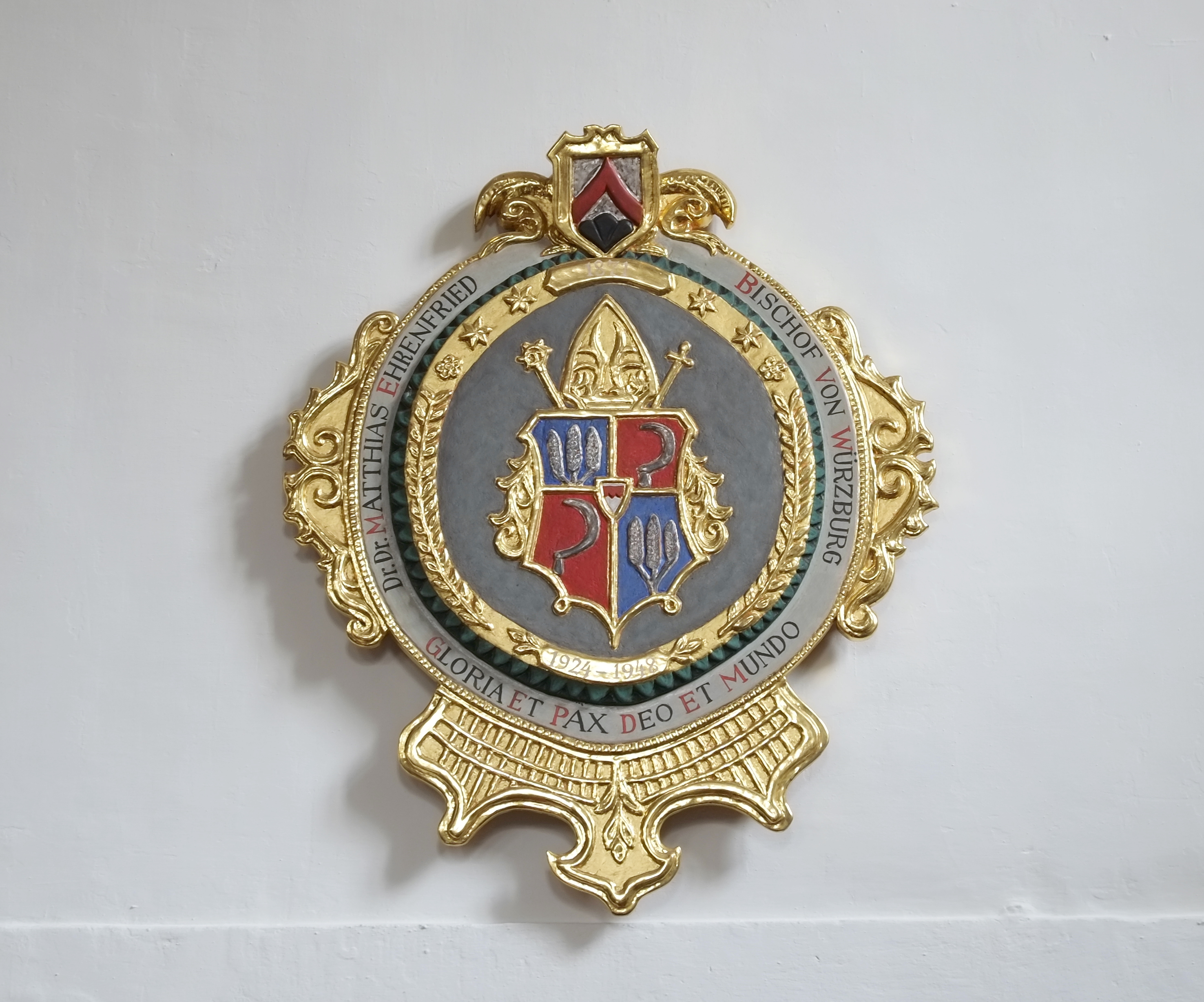 Kirche St. Ottilia in Absberg im Landkreis Weißenburg-Gunzenhausen (Bayern/Deutschland(